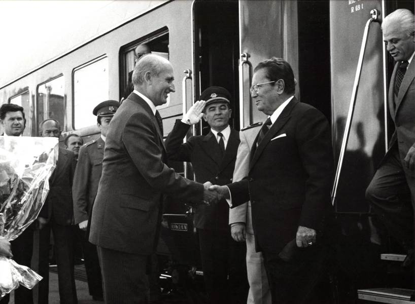 Srpski (latinica): Nandor Major na dočeku predsednika Tita, Šid, 30.09.1977